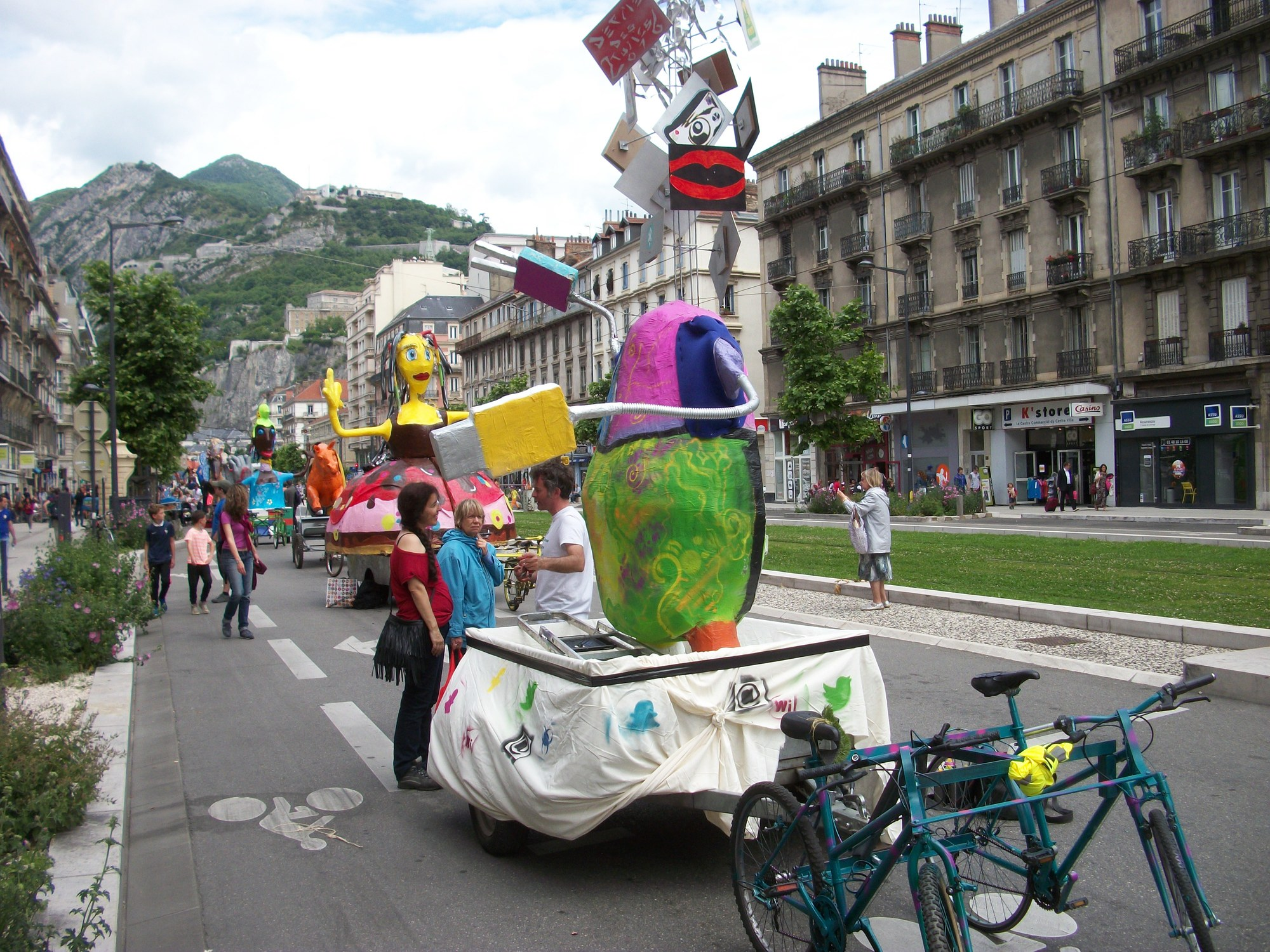 Fete des tuiles le 4 juin 2016 Cours Jean Jaurès à Grenoble, Isère, France Chars